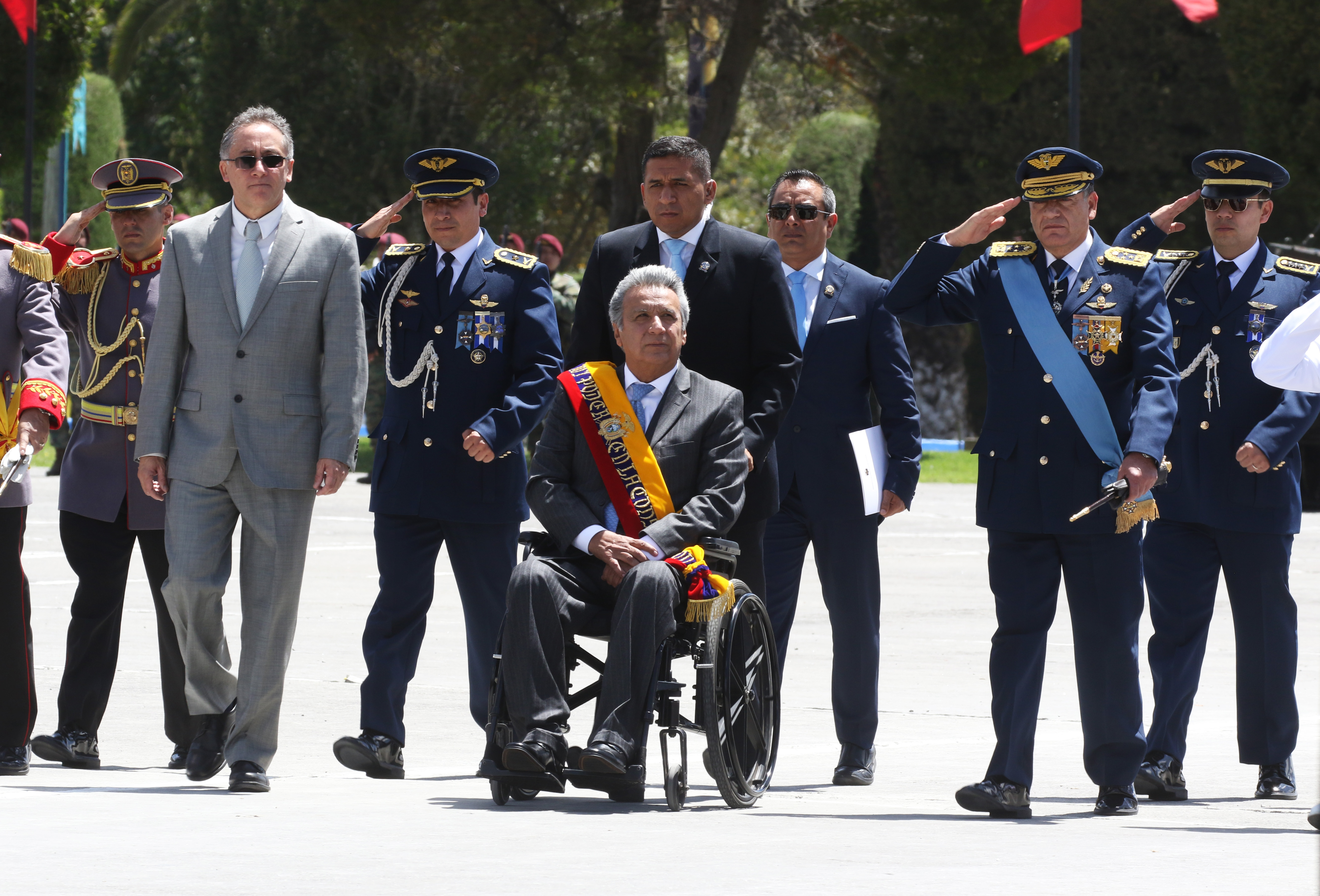 Quito, 10 de agosto de 2017 (Andes).- En la Escuela Militar Eloy Alfaro, ESMIL, se llevó a cabo la Ceremonia Castrense por los 208 años del Primer Grito de Independencia. El evento contó con la presencia del primer Mandatario de la República Lenín Moreno y varios ministros de Estado. ANDES/Micaela Ayala V.